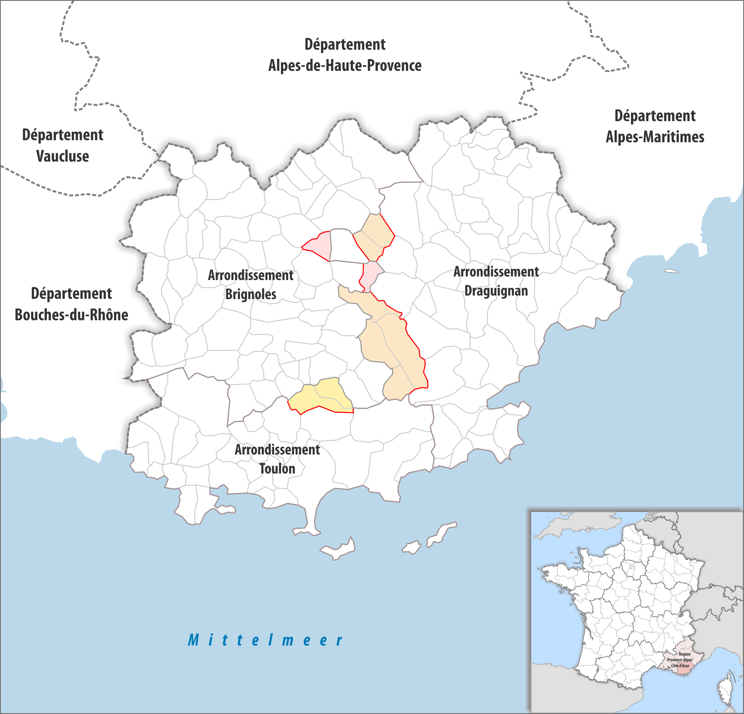 Arrondissements Anpassungen auf 2017 im Departement Var